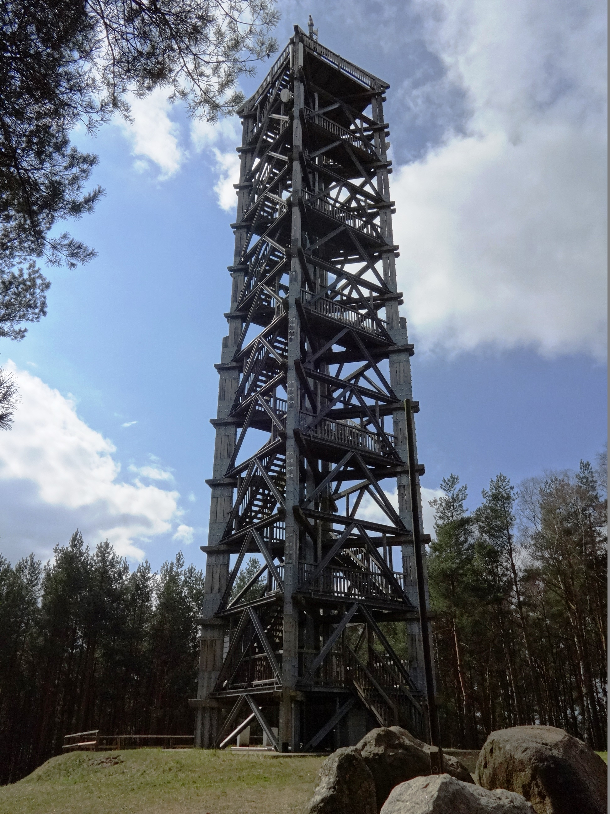 Der Aussichtsturm Blumenthal befindet sich nordöstlich von Blumenthal, einem Ortsteil von Heiligengrabe in der Ostprignitz (Brandenburg). Er wurde zwischen 2003 und 2004 erbaut und ist 45 Meter hoch. Auf dem Weg zum Turm befinden sich mehrere Informationstafeln mit touristischen Informationen zum Turm und zur Umgebung.